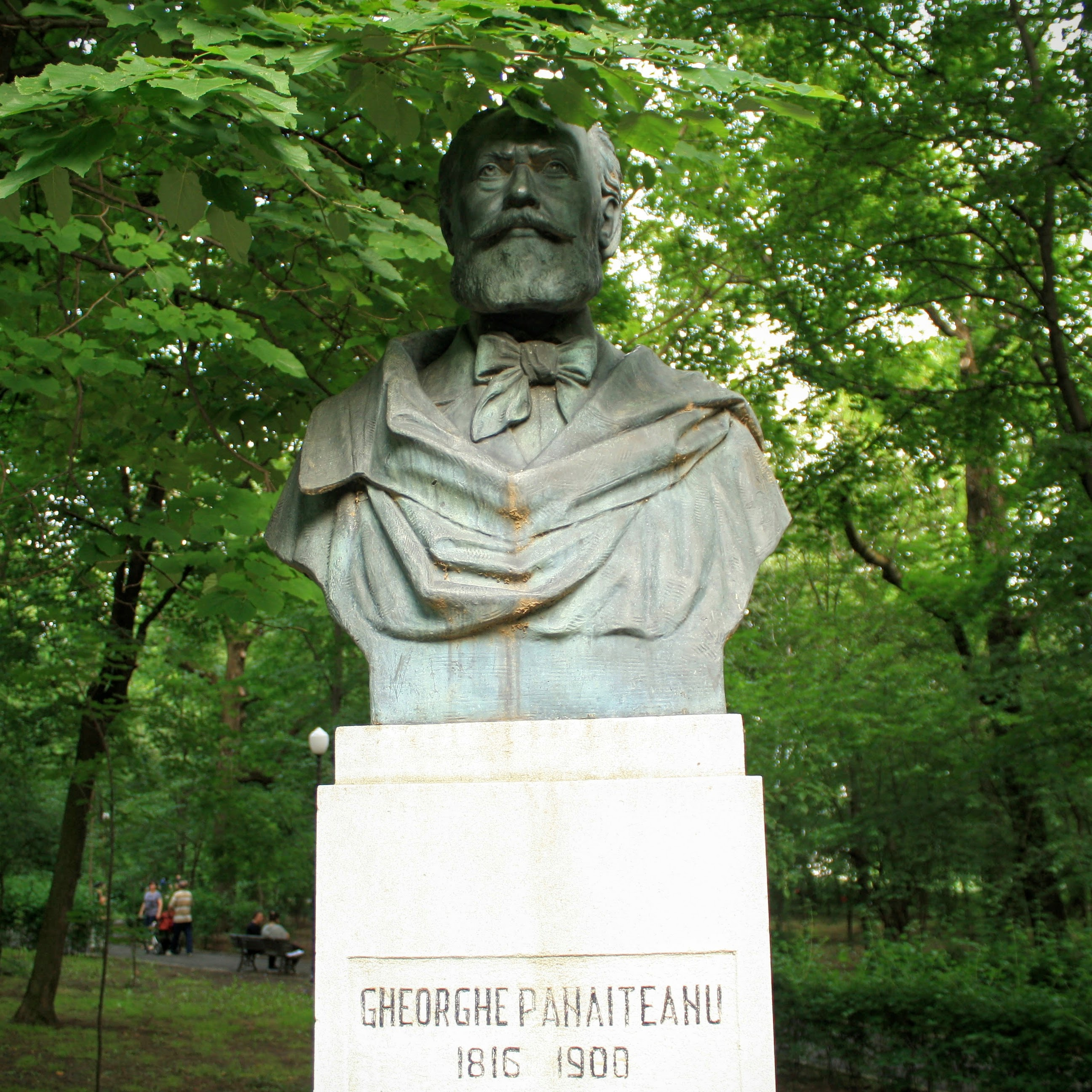 Bustul lui Gheorghe Panaiteanu-Bardasare din Parcul Copou, Iaşi